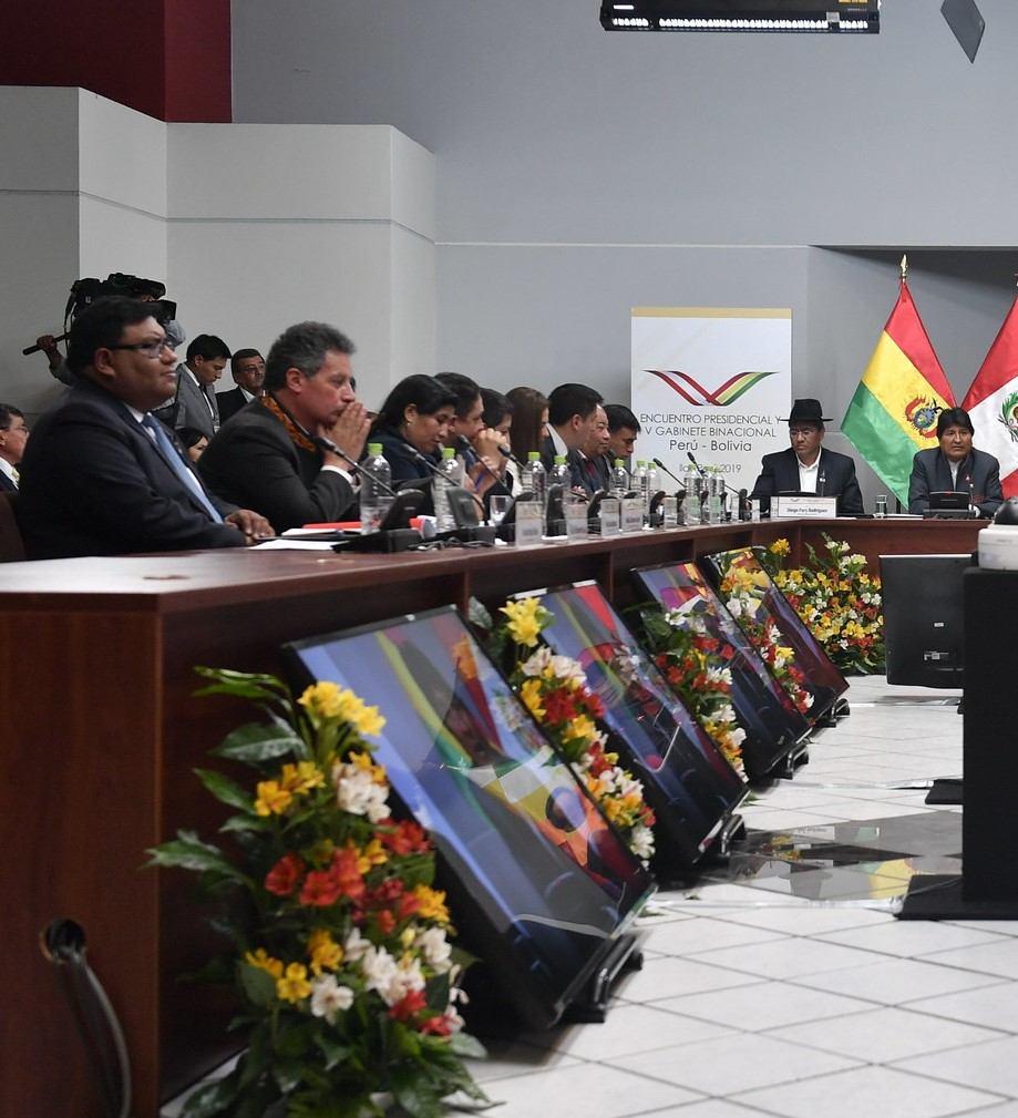 Gabinete de Evo Morales,presidente de Bolivia en 2019.